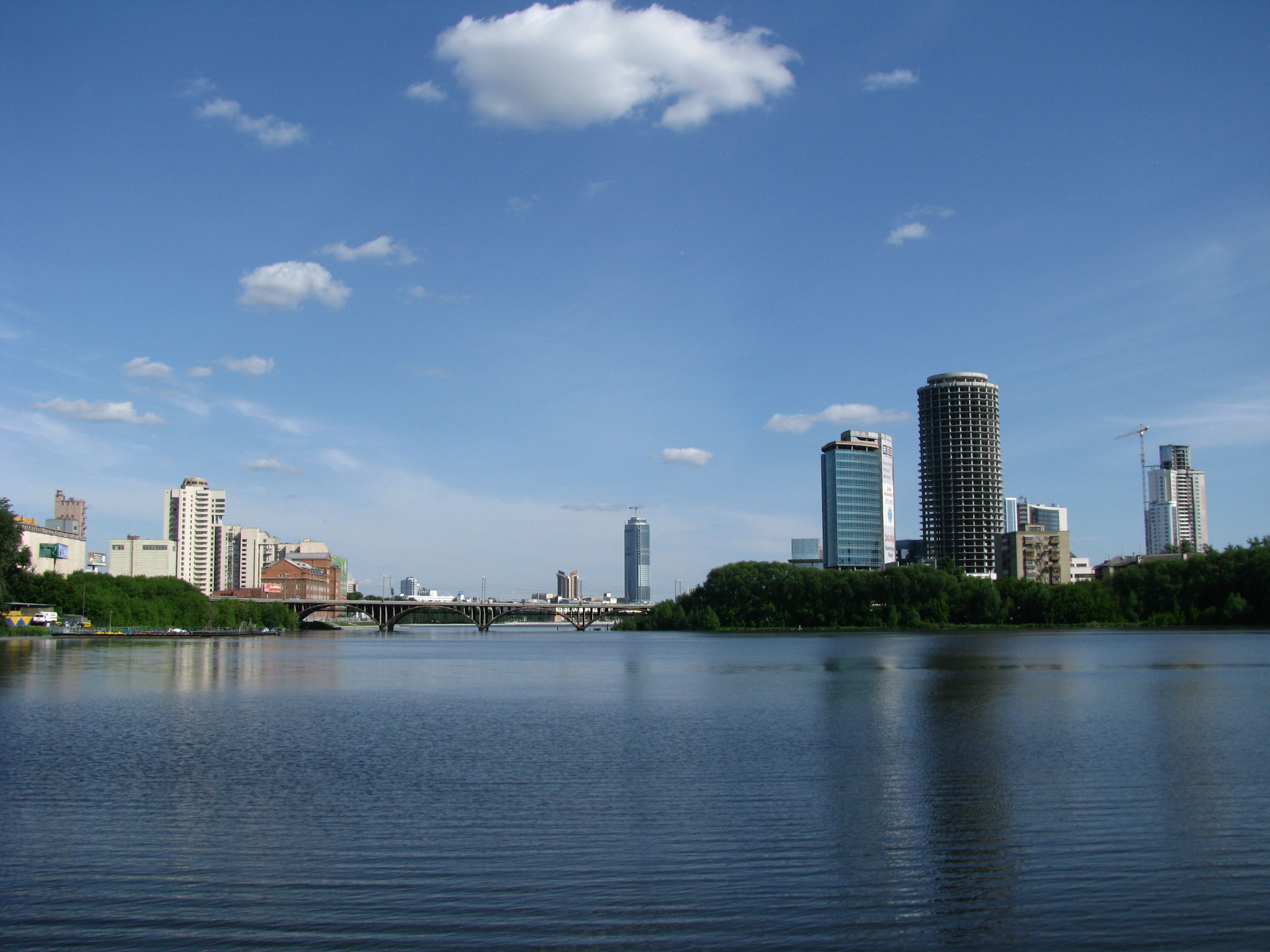 Вид на Городской пруд от парка возле УрГУПСа